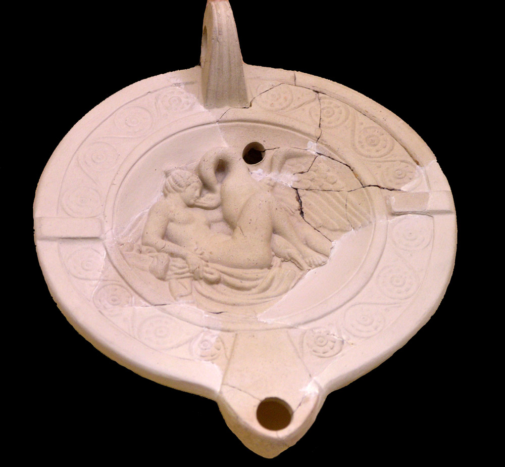 Léda et le cygne sur une lampe attique, IIIe siècle ap. J.-C.